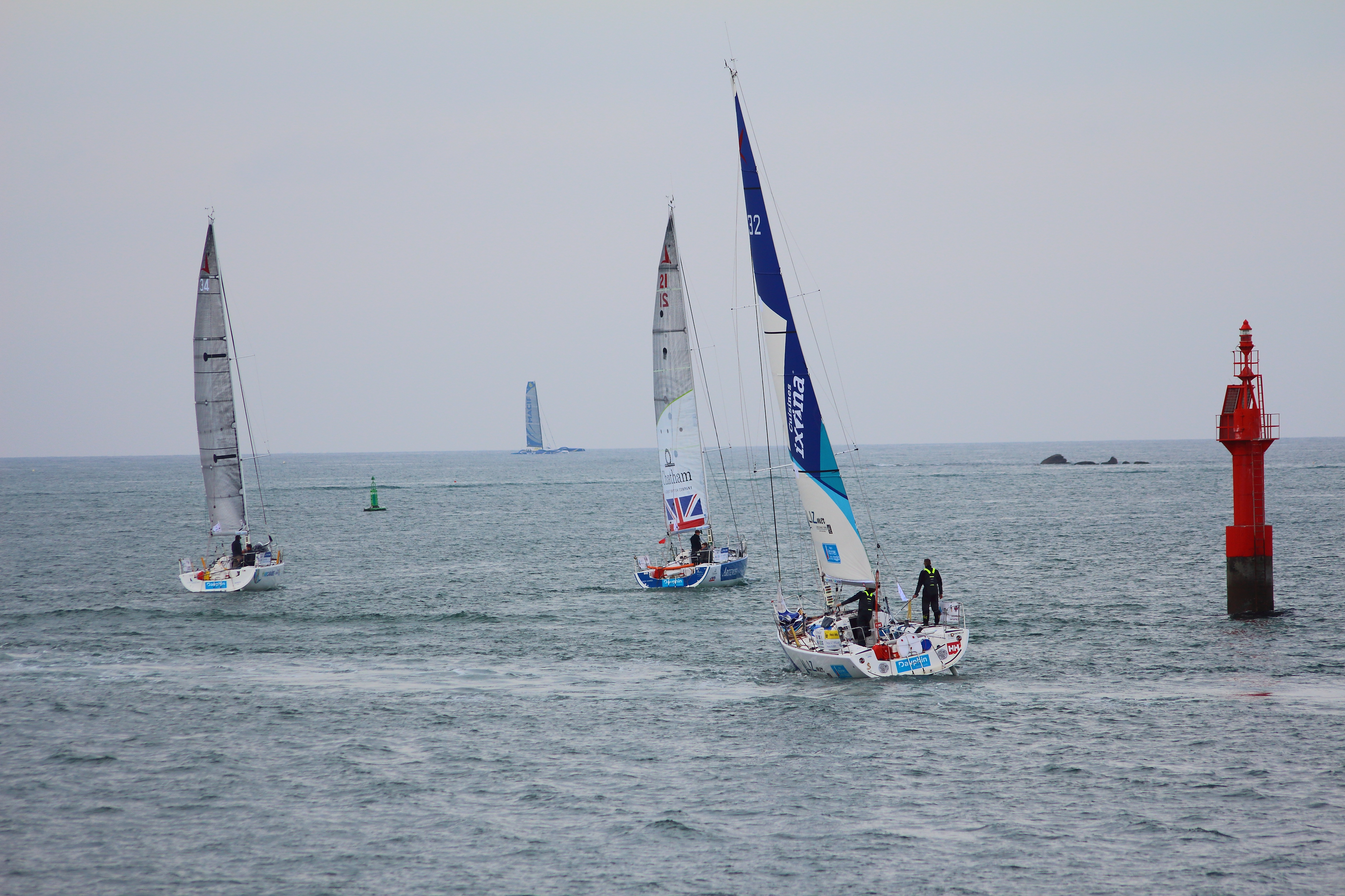 Sortie des voiliers de classe Figaro du port de Concarneau (Finistère, Bretagne, France) et contournant la Médée avant le départ de la Transat AG2R 2016.